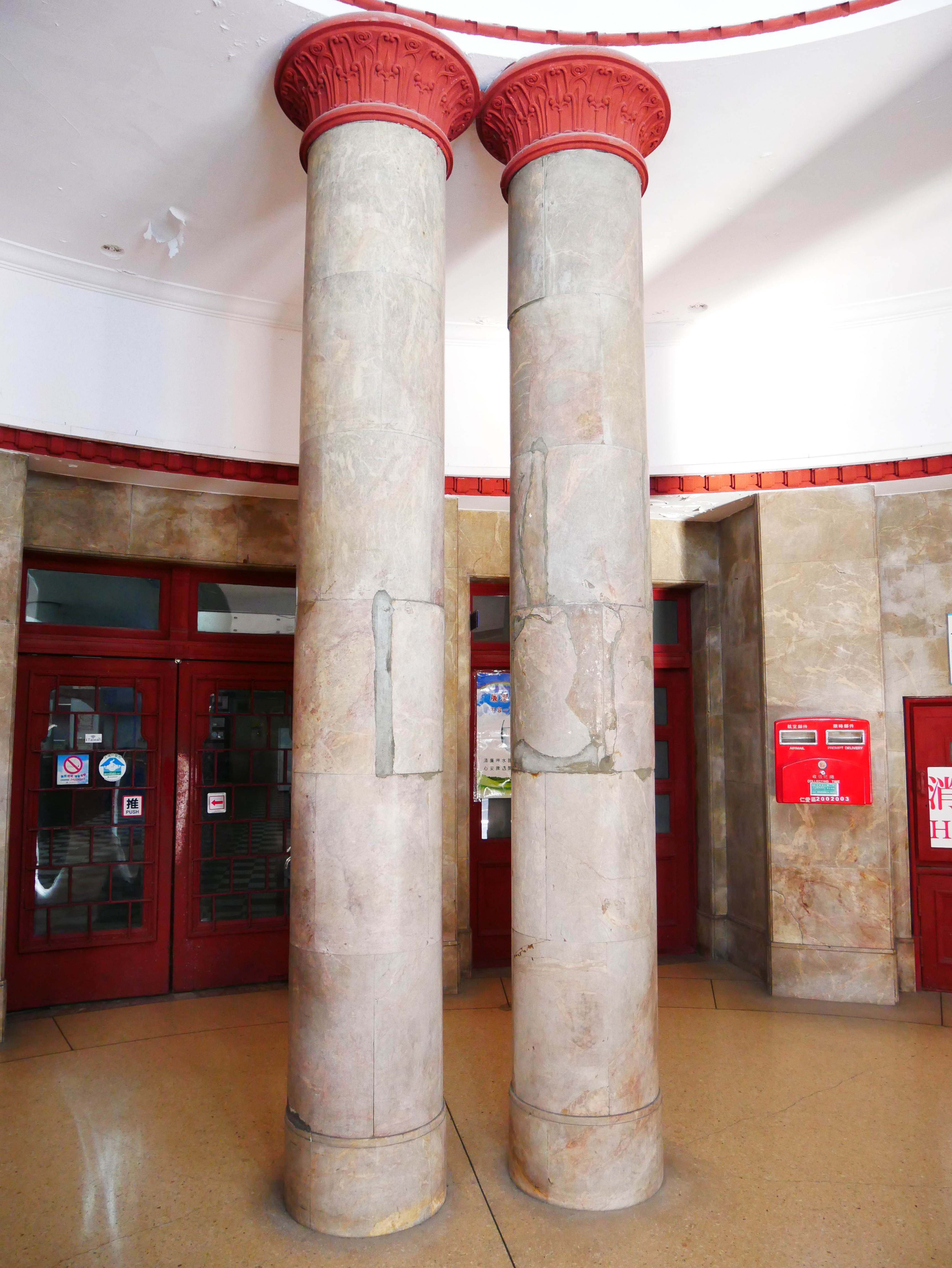 中文（台灣）: 基隆港合同廳舍大廳科林斯式柱，基隆市仁愛區文昌里